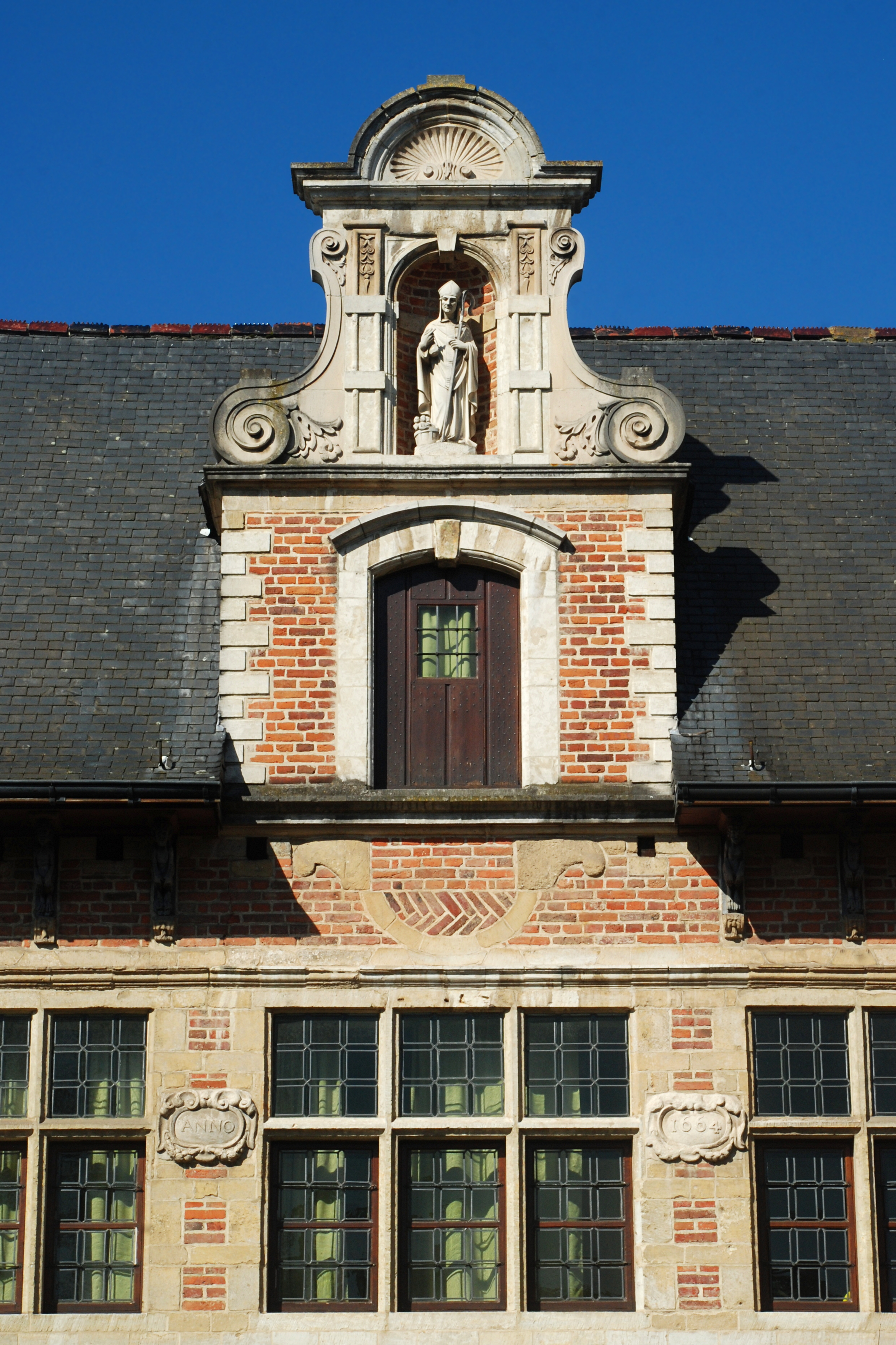 Belgium - Leuven - Groot Begijnhof - Maison Saint-Nicolas - Benedenstraat n° 59